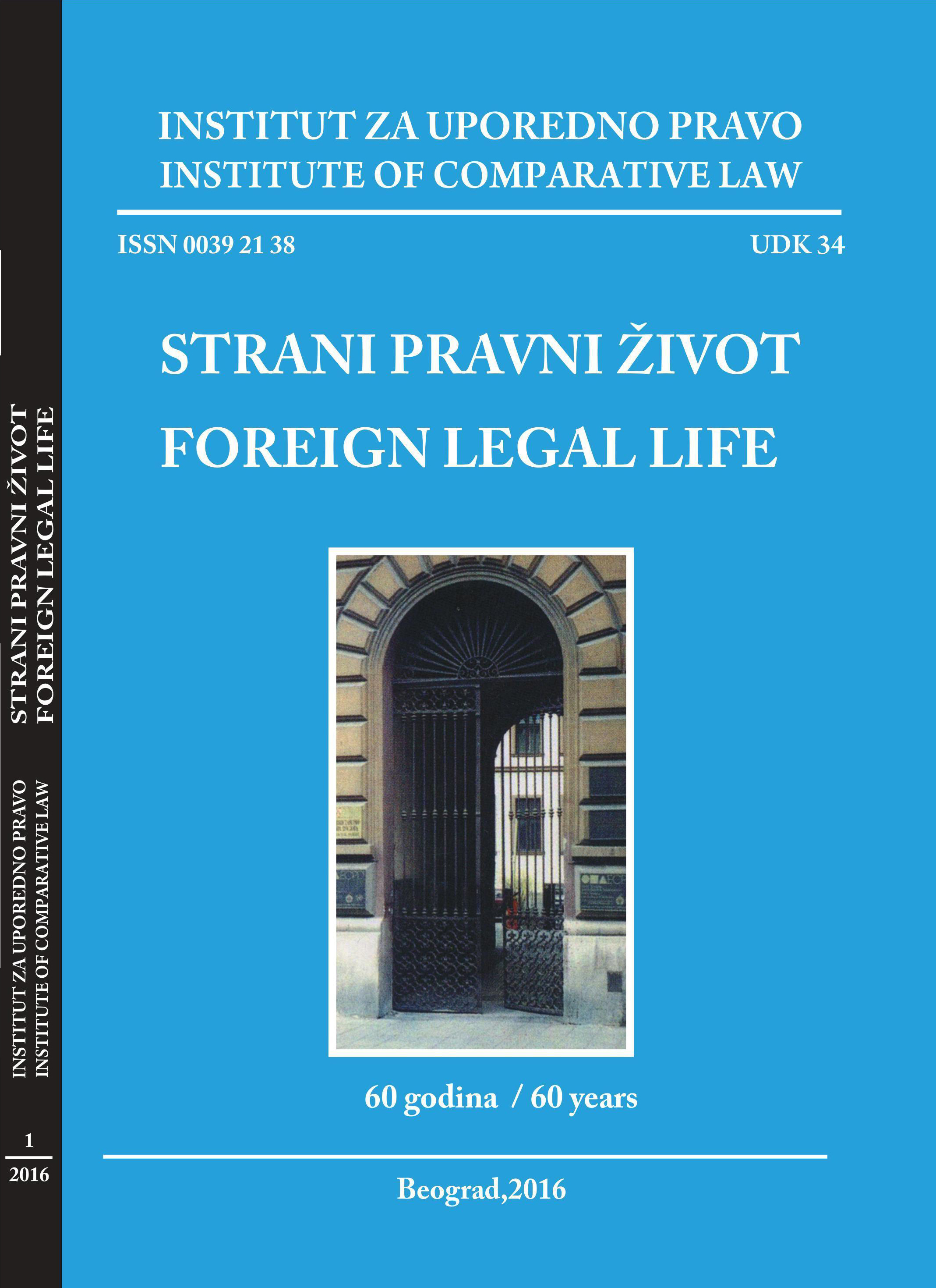 Korica časopisa „Strani pravni život“